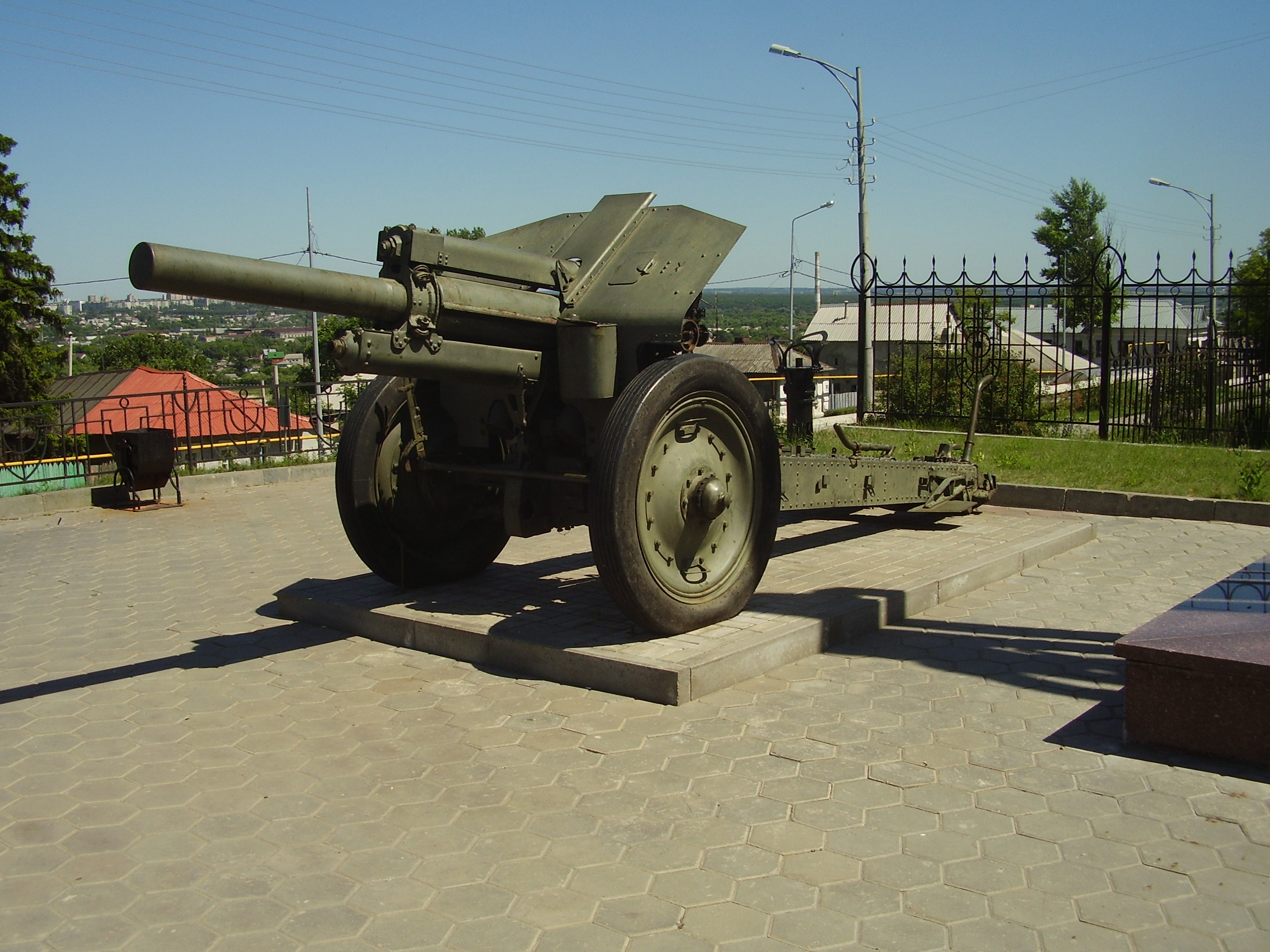 Старый Оскол. Гаубица М-30 недалеко от Оскольского универмага